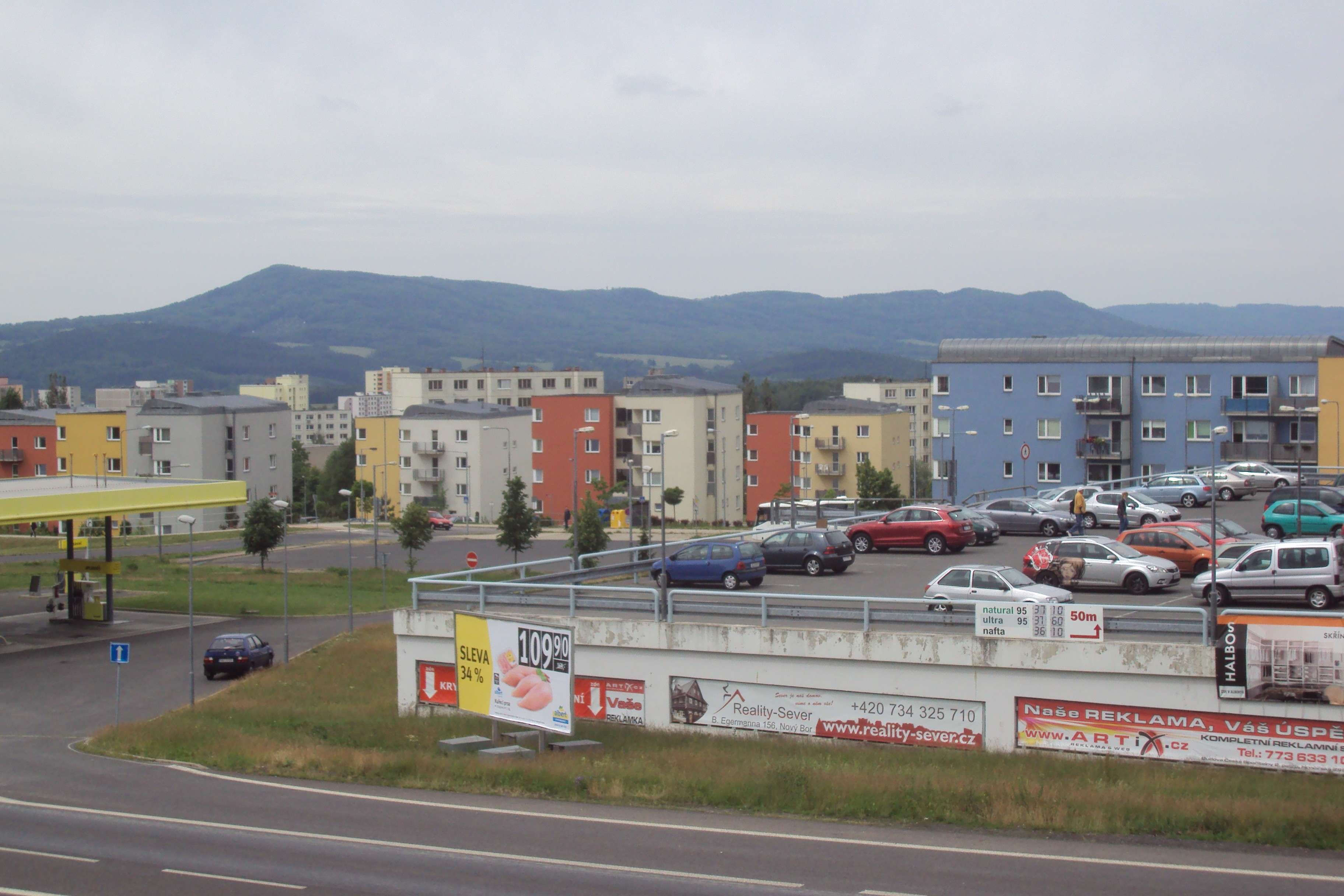 Kozelský hřeben od sídliště Špičák v České Lípě, dole Borská výpadovka, vpředu sídliště Slovanka, vrchy levý Kozel 597, pravý Králův vrch 536